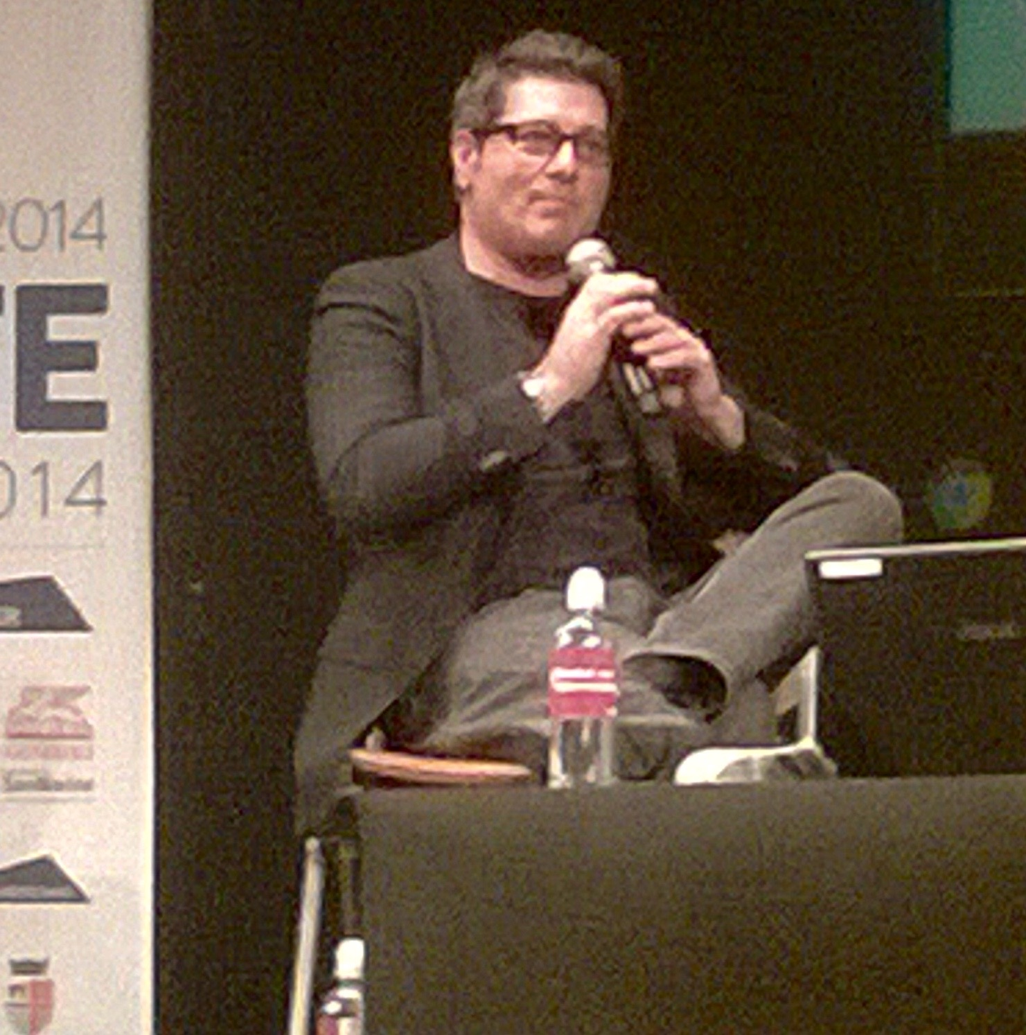 Enrico Papi a Rimini durante la Festa della Rete nel settembre 2014